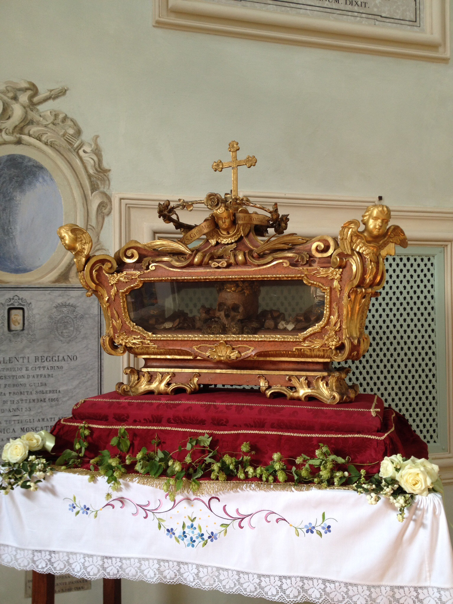 L'urna contenente i resti di san Giulio martire. La teca è portata in processione lungo la strada di San Giulio per la sagra, che si svolge l'ultima domenica di agosto. Durante l'anno è custodita all'interno dell'oratorio.